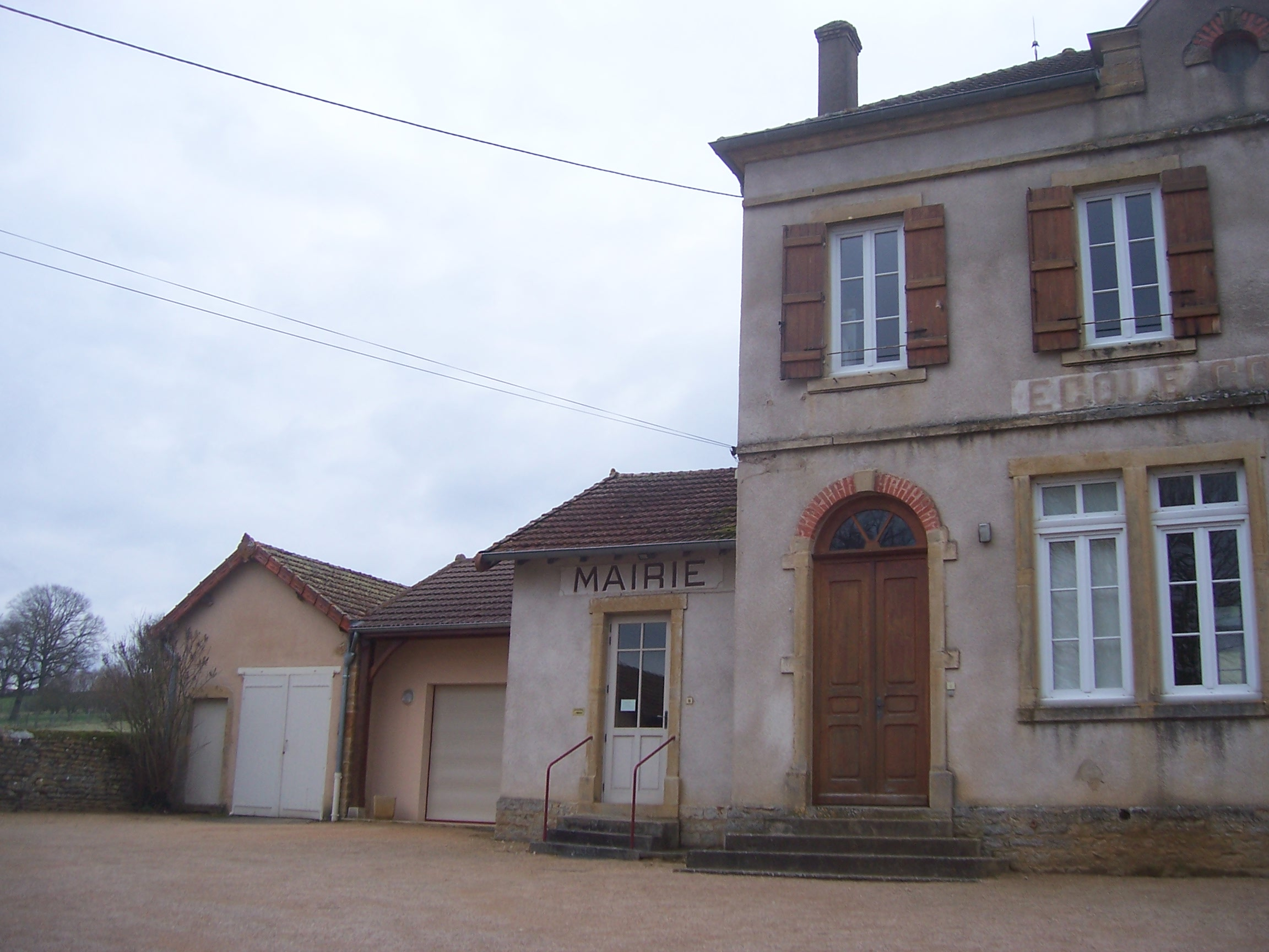 Mairie de Saint-Vincent-des-Prés